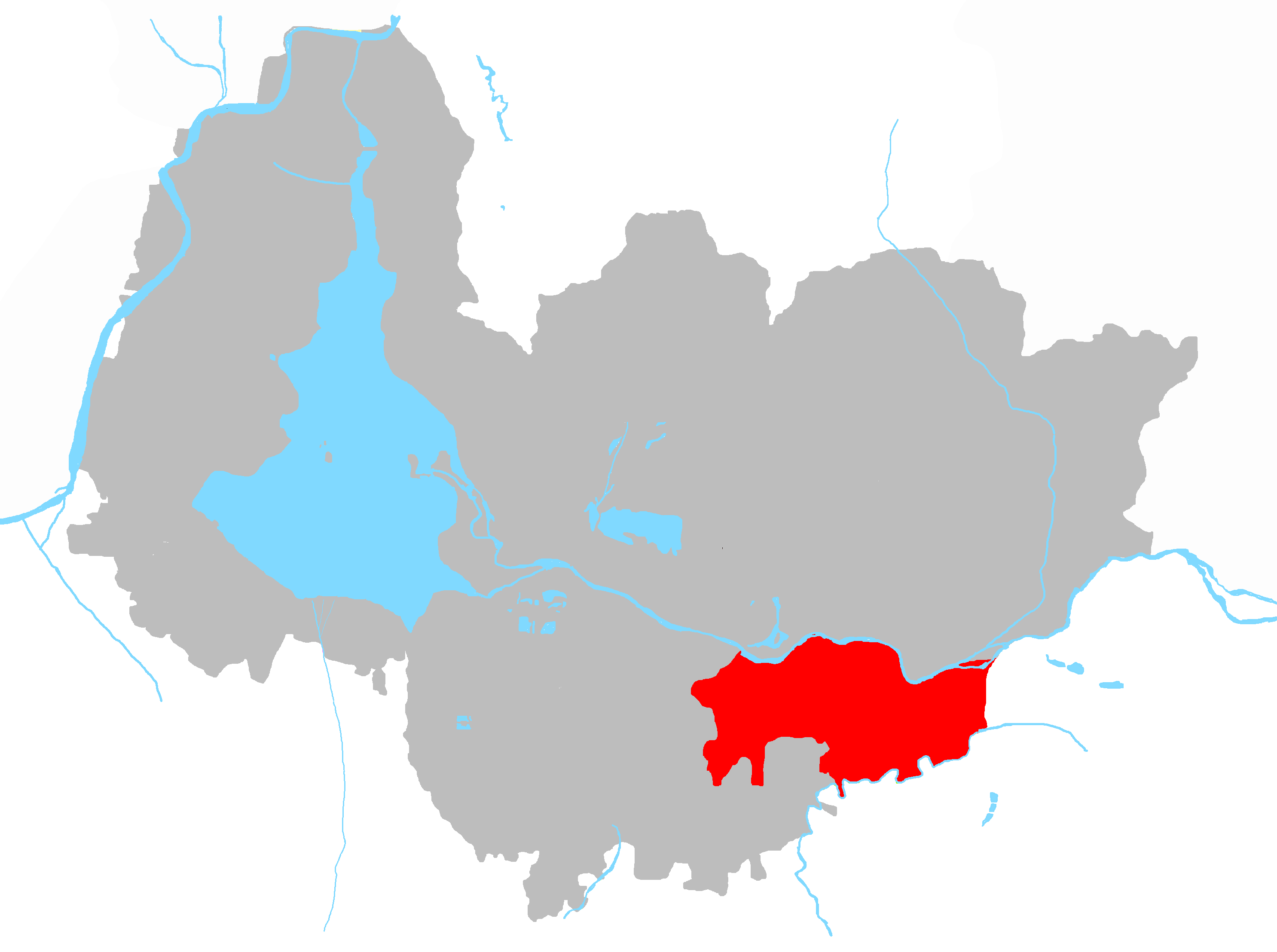 彭集街道在东平县的位置